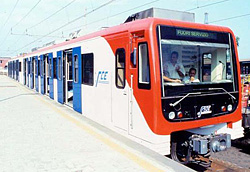 Vettura Firema della metropolitana di Catania in arrivo alla stazione di Porto.